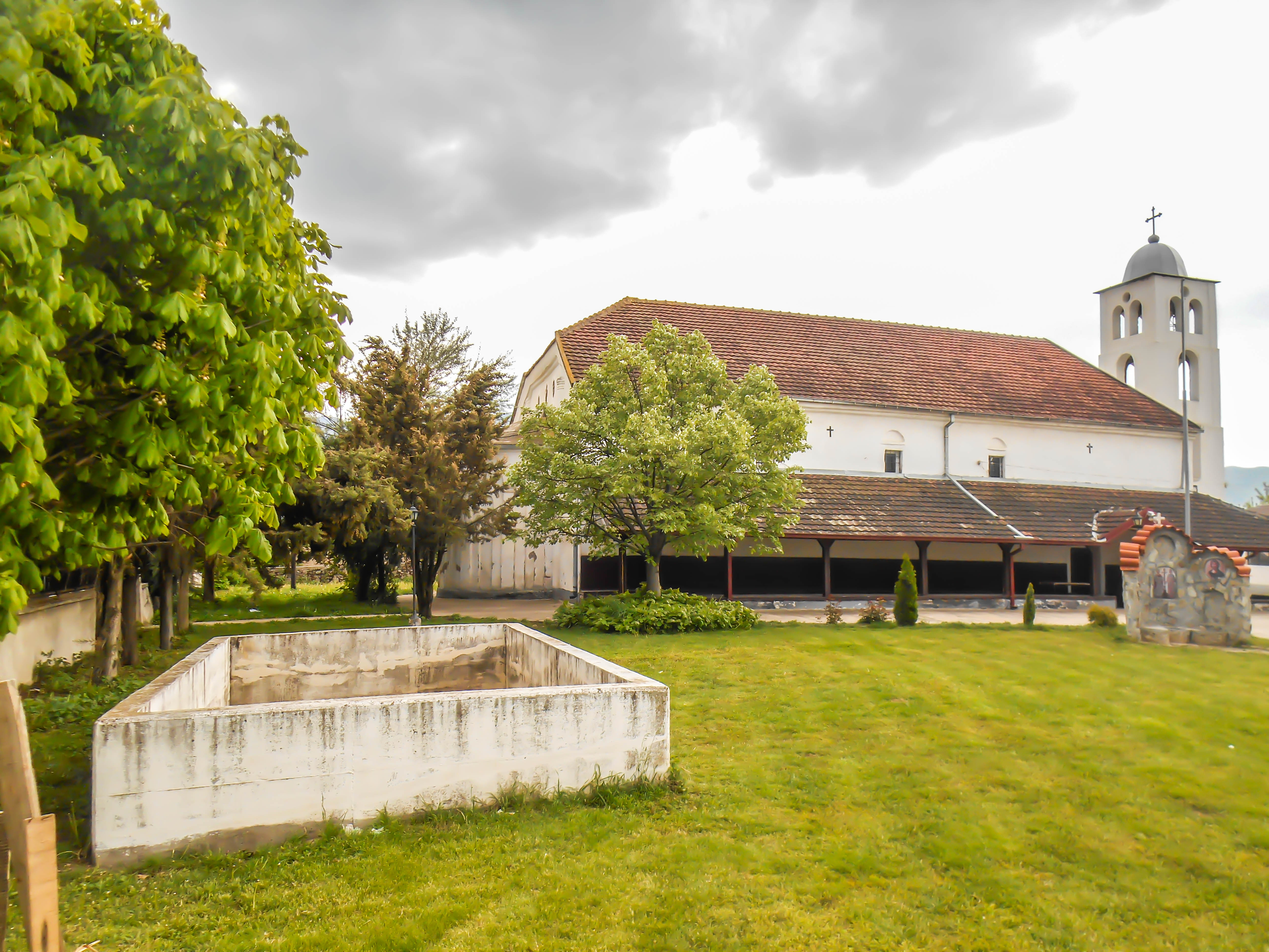 Црква „Св. Константин и Елена“ - Моноспитово